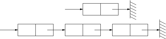 Première étape de l'ajout d'un élément dans une liste chaînée. Dessin réalisé sous xfig par moi même. Licensing Catégorie:Schémas